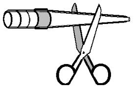 Conector Tubular Cônico deve ser cortado transversalmente, como indicado na figura, no maior diâmetro que possibilite conexão firme com o diâmetro interno do dreno torácico.